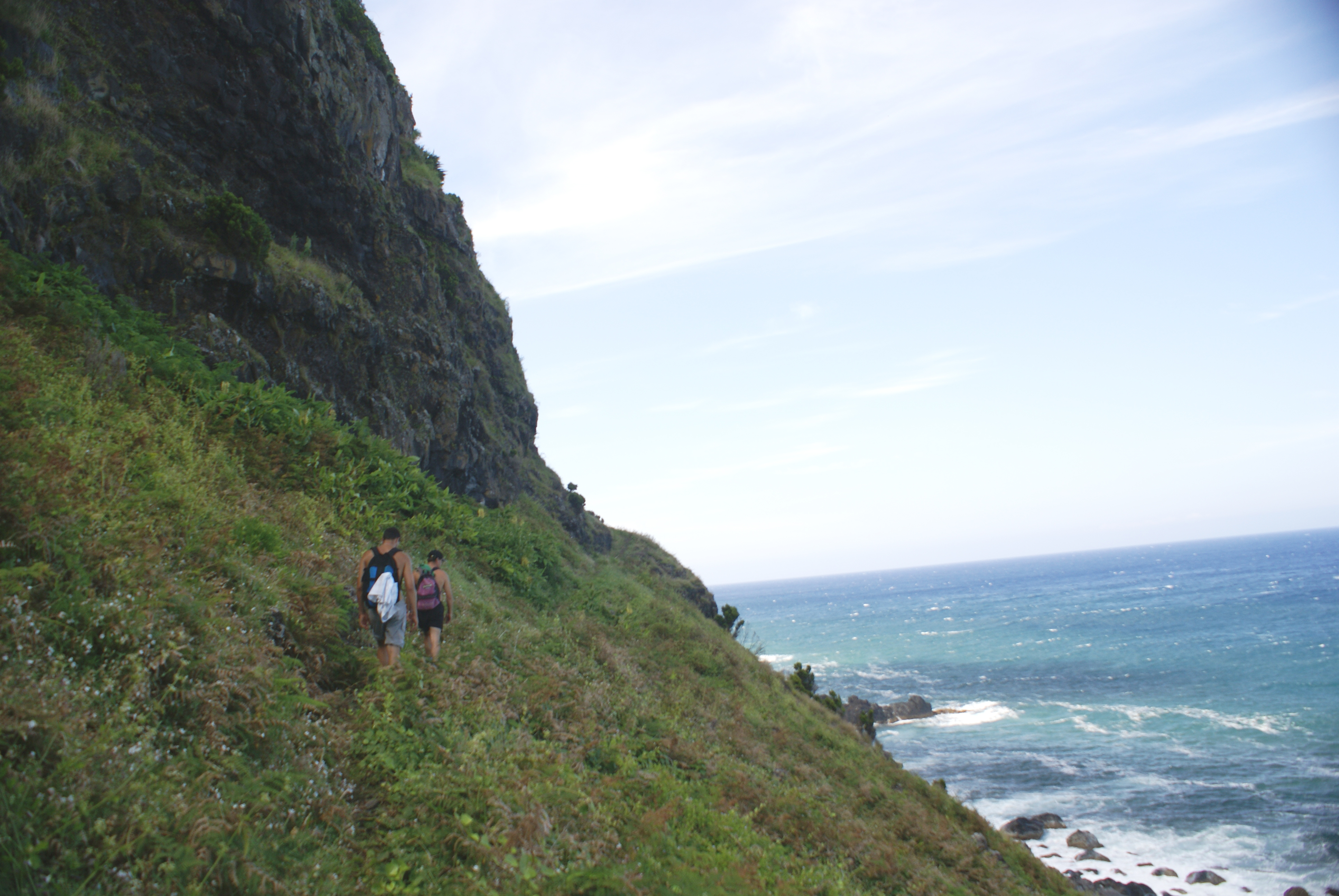 Fajã de Vasco Martins, por entre as veredas, Velas, ilhas de São Jorge, Açores